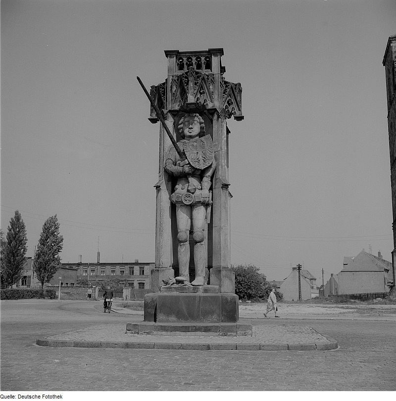 Original image description from the Deutsche Fotothek Zerbst. Roland